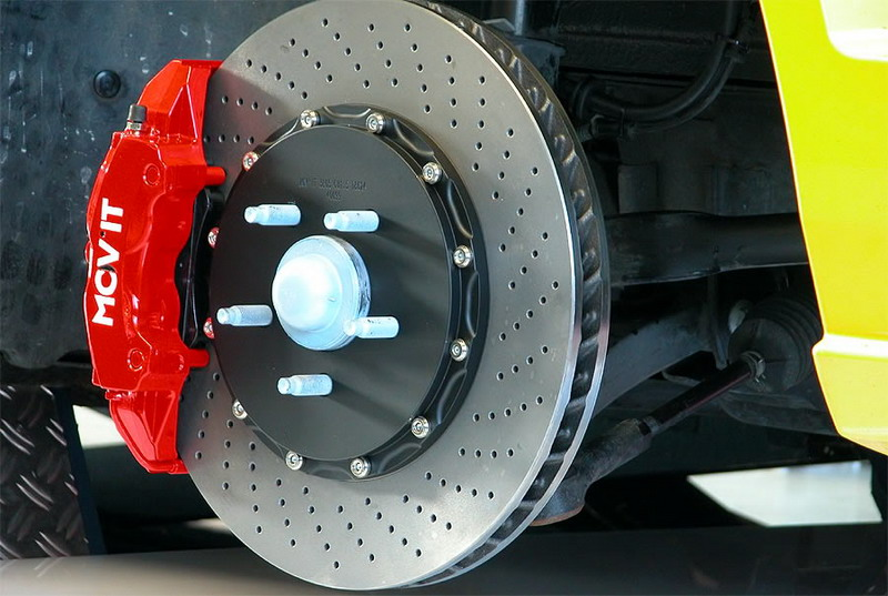 Bremsscheibe innenbelüftet am Pkw